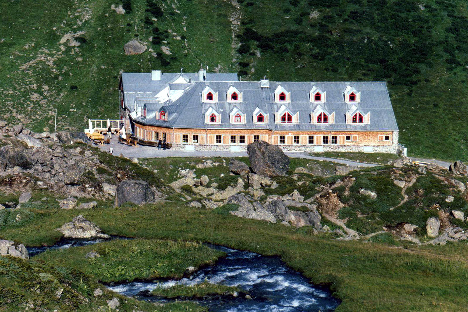 Jamtalhütte (DAV Sektion Schwaben), 2165 m Höhe, im Jamtal 15 km südlich von Galtür gelegen, Silvretta